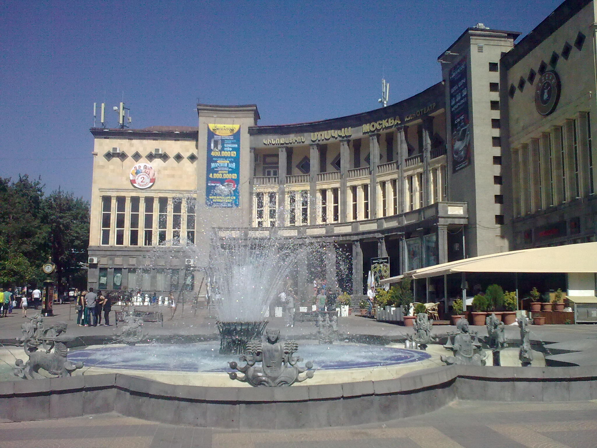 Կինոթատրոն «Մոսկվա» 6/178.3.1